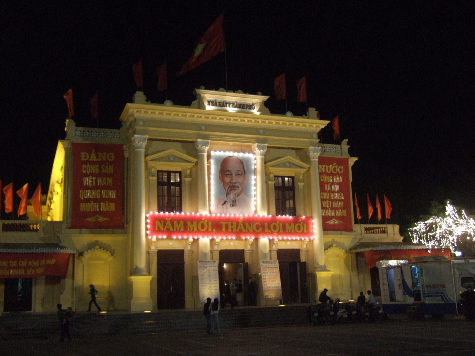 Nhà hát thành phố Hải Phòng, Việt Nam